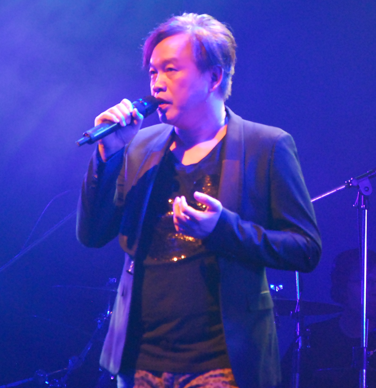 台語新浪潮台北場 康康現場演唱